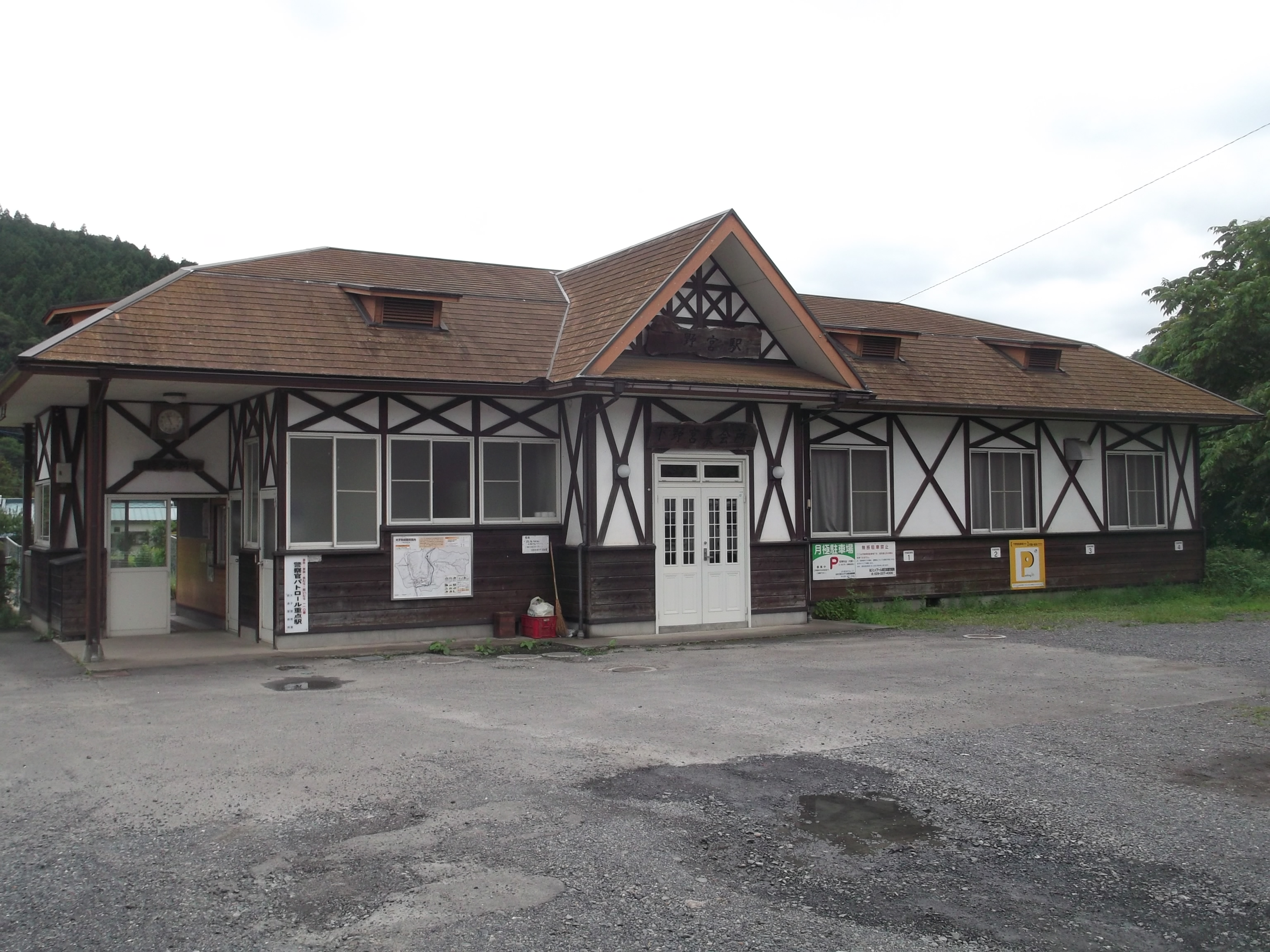 水郡線 下野宮駅